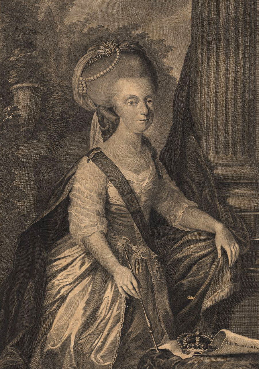 Dona Maria I, a Louca, rainha de Portugal.